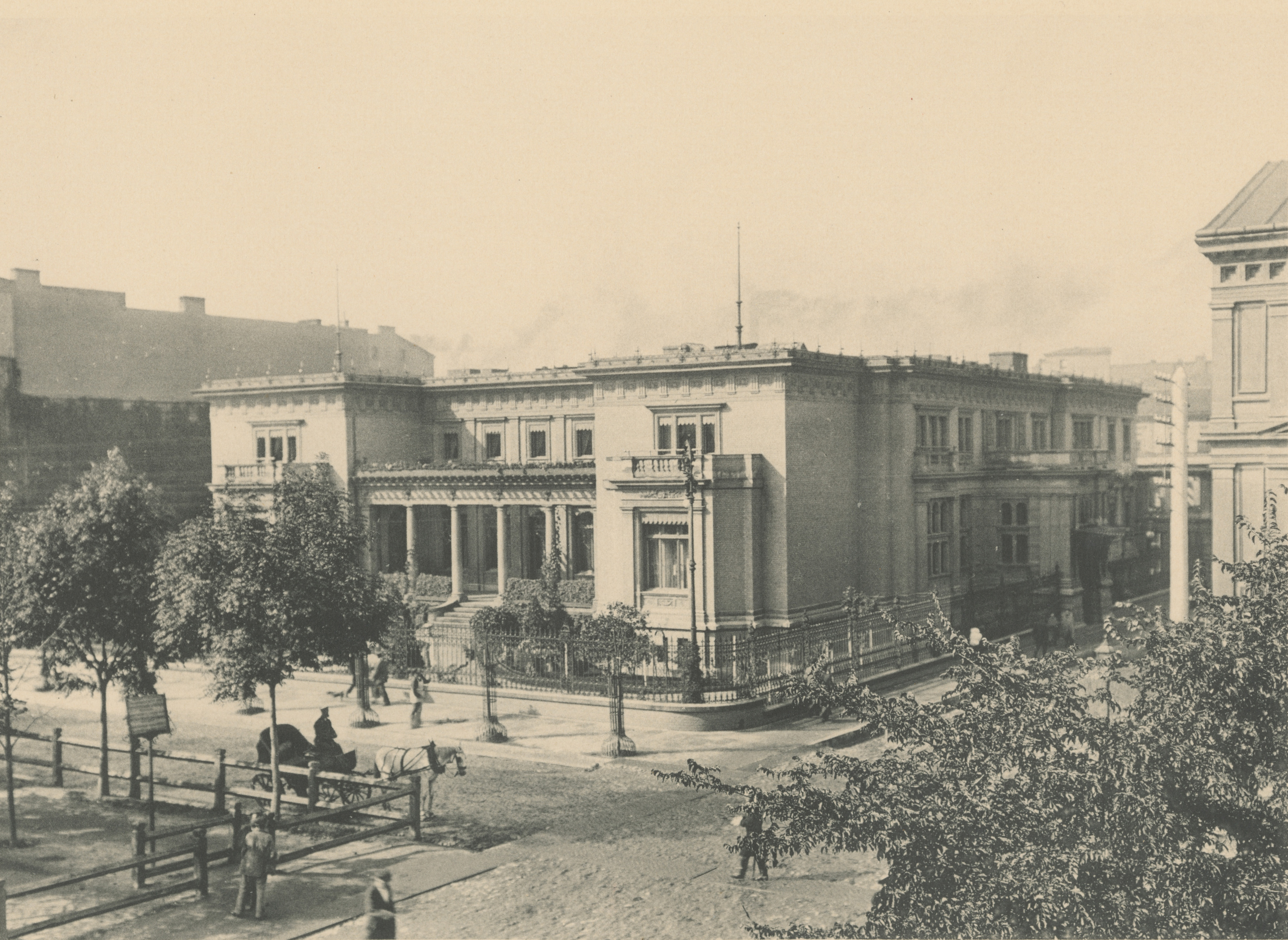 Fotografia przedstawia willę Juliusza Kunitzera mieszcząca się przy skrzyżowaniu ulic Benedykta (obecnie 6-Sierpnia) i Spacerowej (obecnie aleja Kościuszki). Wybudowana w 1888 roku w stylu neorenesansowym. Po zabójstwie w 1905 roku właściciela, wynajmował ją od wdowy po Kunitzerze generał-gubernator Michaił Kaznakow. 12 października 1909 roku budynek został sprzedany na licytacji Ludwikowi Wilczyńskiemu, współwłaścicielowi znajdującej się przy ulicy Spacerowej 23/25 przędzalni i tkalni wełny. Planował on przebudować willę, lecz w trakcie robót w 1910 roku budynek spłonął. Działkę zakupił łódzki Bank Handlowy i po uprzątnięciu placu wybudował nową siedzibę banku. Ulica Spacerowa przy której znajdowała się willa zwana także Promenadą lub ulicą Promenadową, została założona jeszcze w XIX wieku, jako deptak. W 1917 roku w stulecie śmierci Tadeusza Kościuszki otrzymała jego imię. W 1935 roku ułożono nawierzchnię z klinkieru. W latach 50. XX wieku deptak został zlikwidowany, a na środku ulicy położono szyny tramwajowe. Natomiast ulica Benedykta wyznaczona również w XIX wieku, nosiła tę nazwę do 1915 roku, następnie po I wojnie światowej stała się na dwa lata ulicą św. Benedykta, ponieważ już w 1919 roku zmieniono ją na 6 Sierpnia. W czasach PRL-u była ulicą 22 Lipca, by w 1990 roku powrócić do przedwojennej nazwy 6 Sierpnia. Fotografia pochodzi z wydanego w 1896 roku albumu Bronisława Wilkoszewskiego „Widoki m. Łodzi”. Saryusz Bronisław Paweł Wilkoszewski (1847-1901), zwany "łódzkim Canaletto" był mistrzem fotografii ilustracyjnej. Udokumentował zabudowę Łodzi z końca XIX wieku przede wszystkim wille, fabryki, budynki użyteczności publicznej, obiekty sakralne, ulicę Piotrkowską. Jego zakład fotograficzny znajdował się w willi "Trianon" w Pasażu Meyera 5 (obecnie ulica Moniuszki).